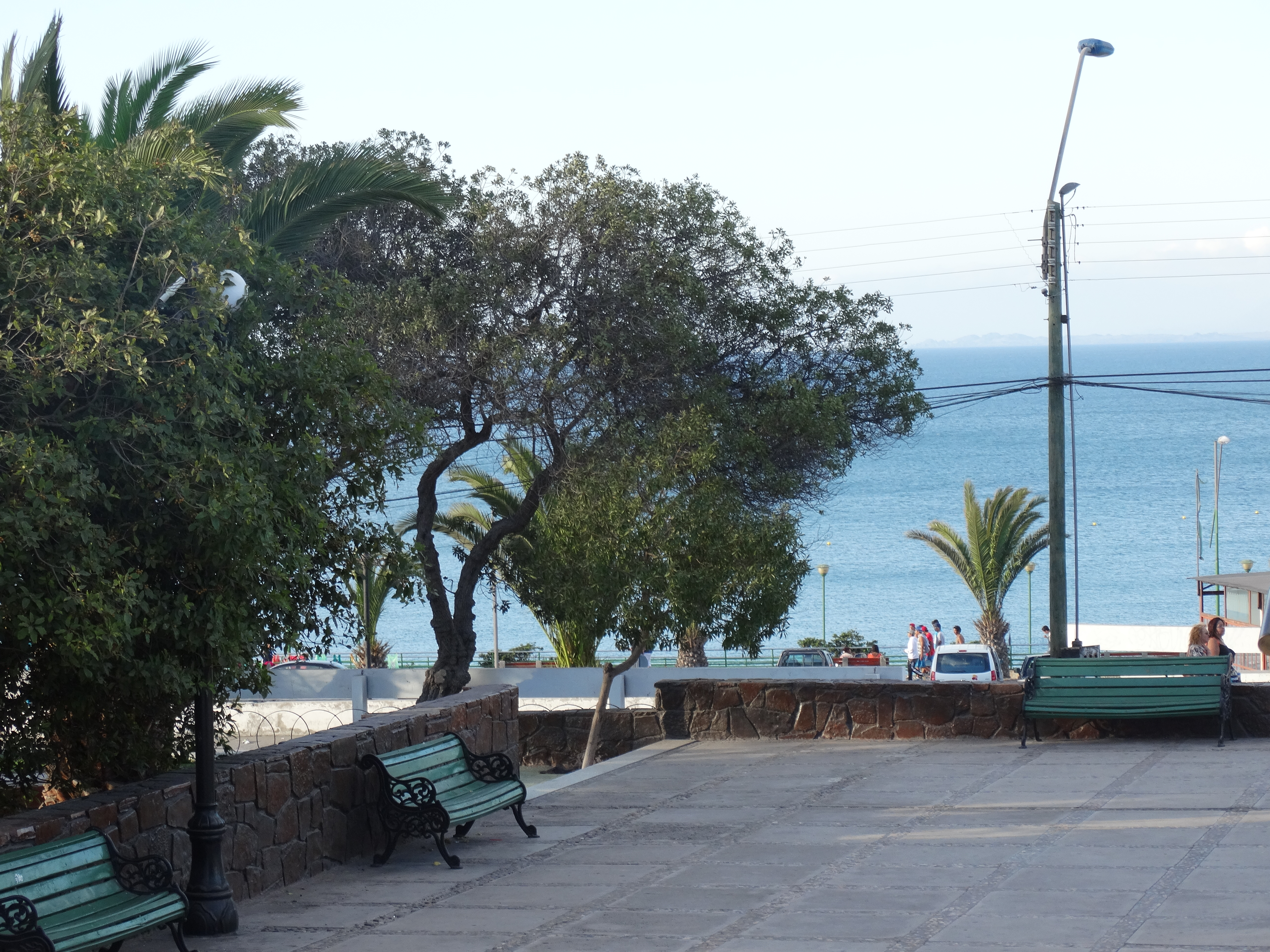 La foto corresponde a la Plaza de Armas de Puerto Huasco, obra del arquitecto Hugo Chacaltana Ortiz.